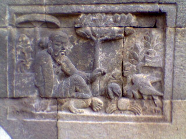 Door Meursault2004 onder GNU-licentie geplaatst (wiki) Berkas:Mendhut-Tantri02.jpg